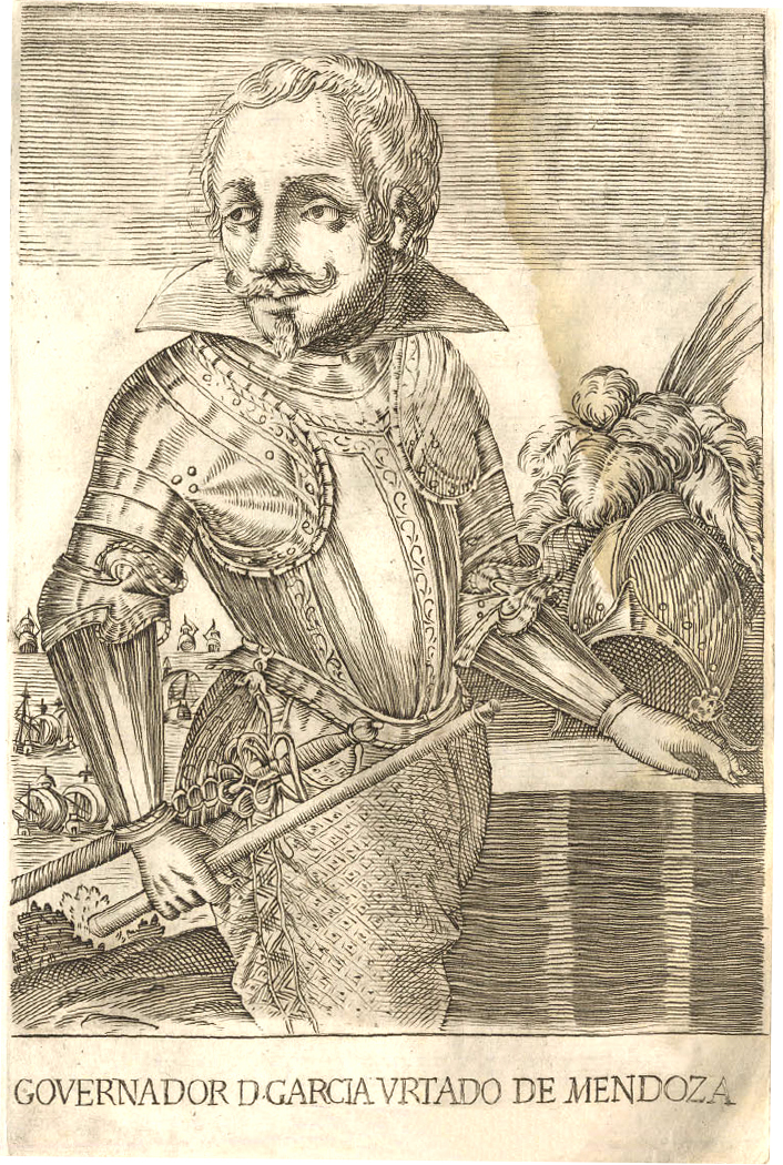 García Hurtado de Mendoza y Manrique "Marqués de Cañete" (Cuenca; 21 de julio de 1535 - † Madrid; 1609) Militar español, Gobernador de Chile y Virrey del Perú.